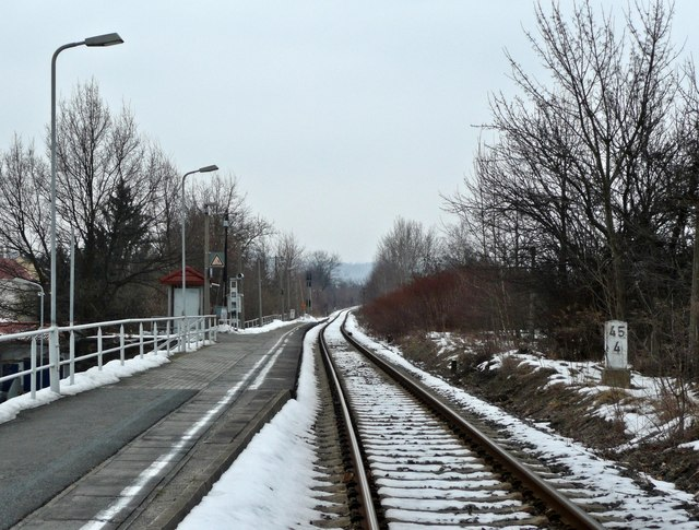 Pirna: Eisenbahnstrecke Pirna - Neustadt am Haltepunkt Pirna-Copitz